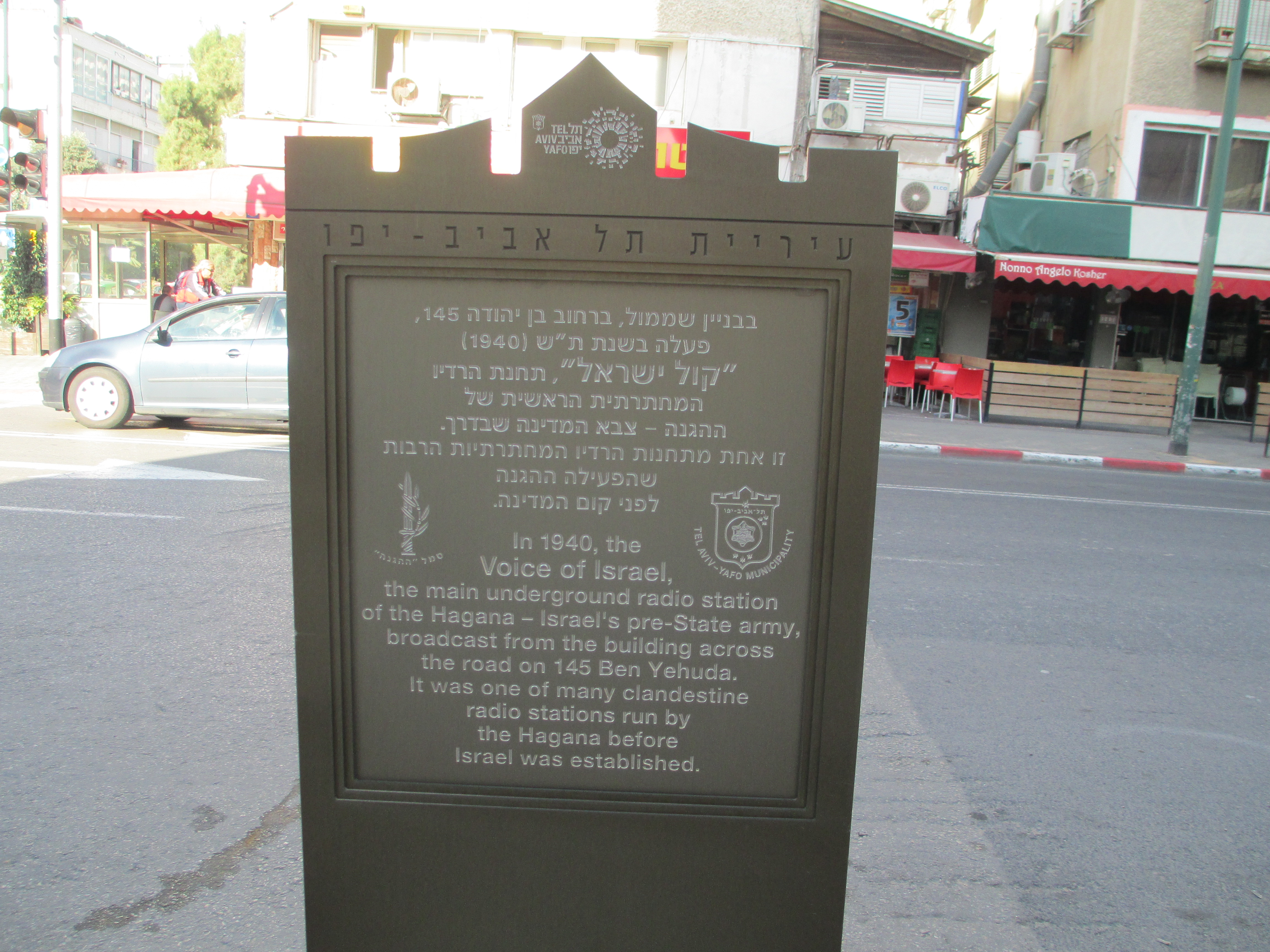 שלט זיכרון חדש מול הבניין בו הייתה תחנת שידור במחתרת של ההגנה ברחוב בן יהודה 145 בתל אביב